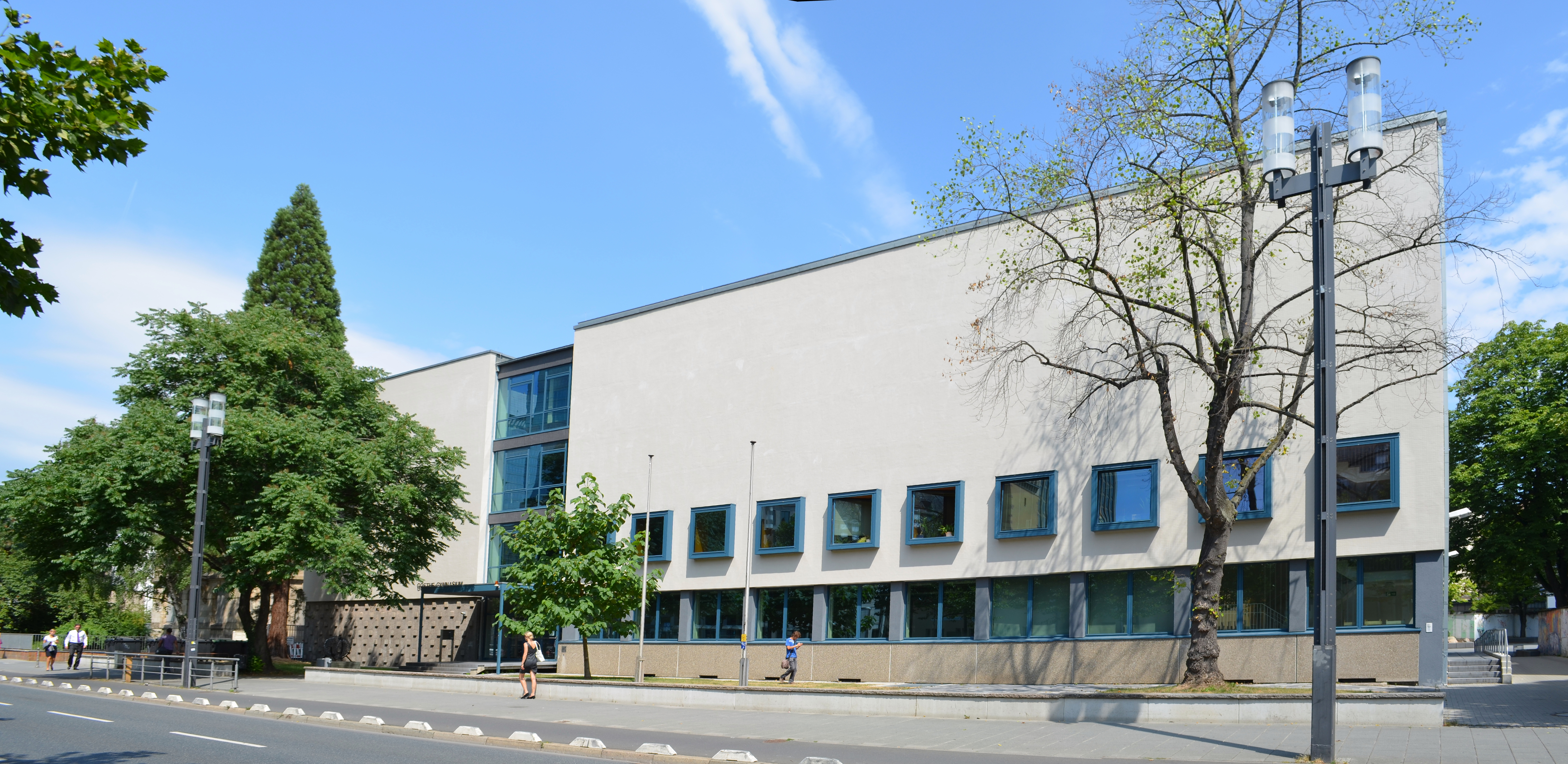 Frankfurt, Goethe-Gymnasium, Straßenseite